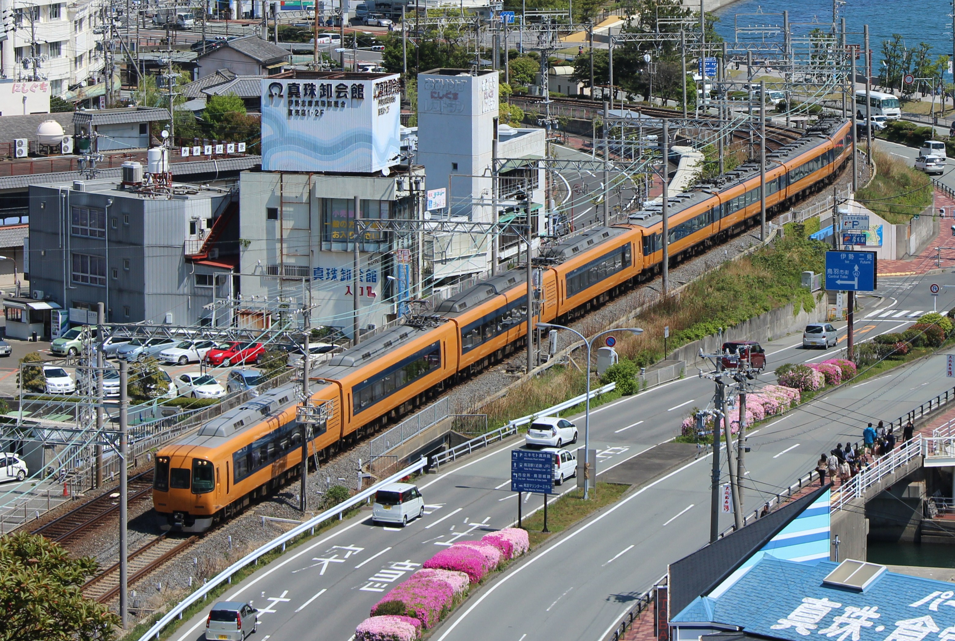 近鉄22000系